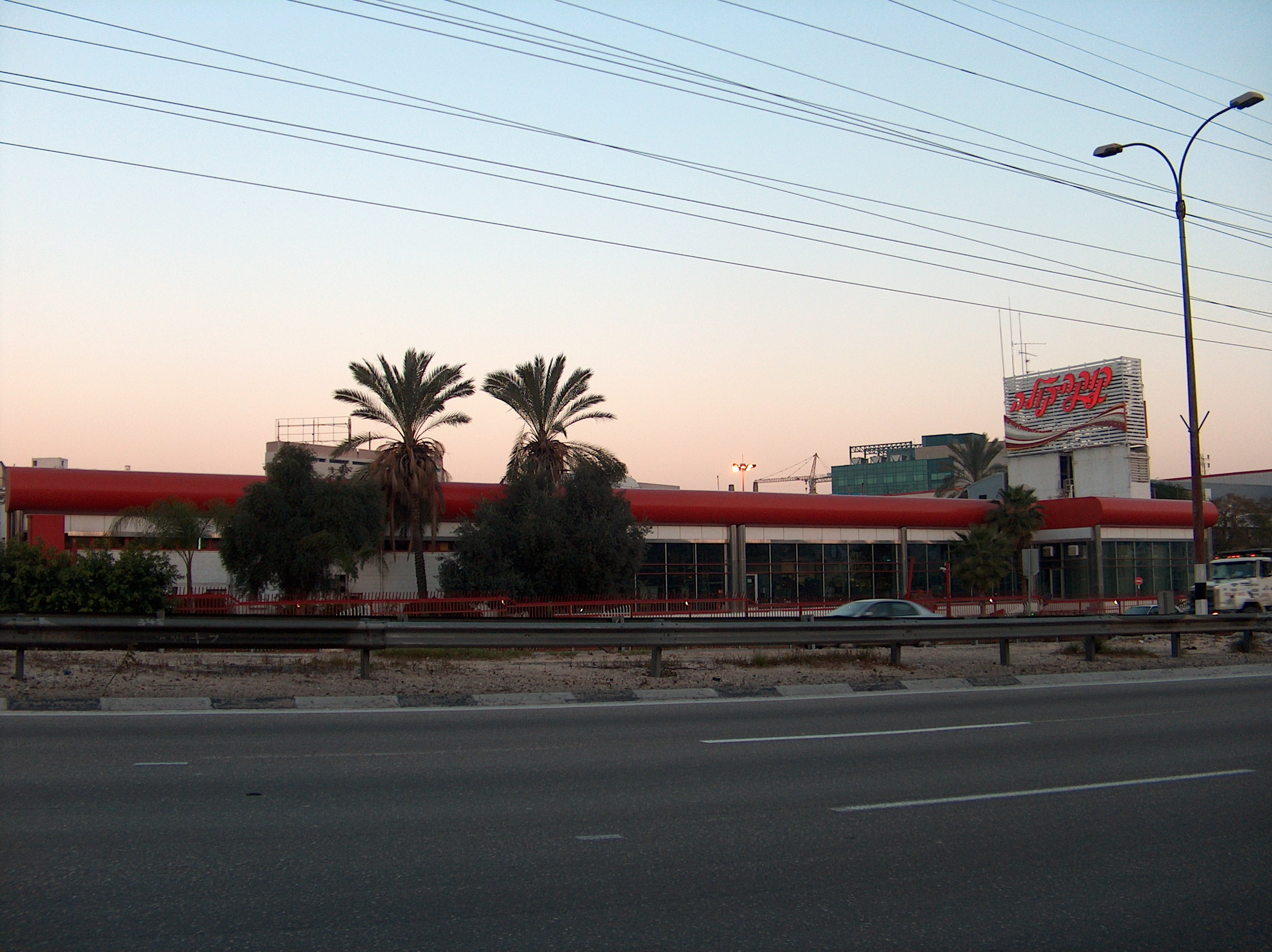 Bene Beraq / Bnei Brak